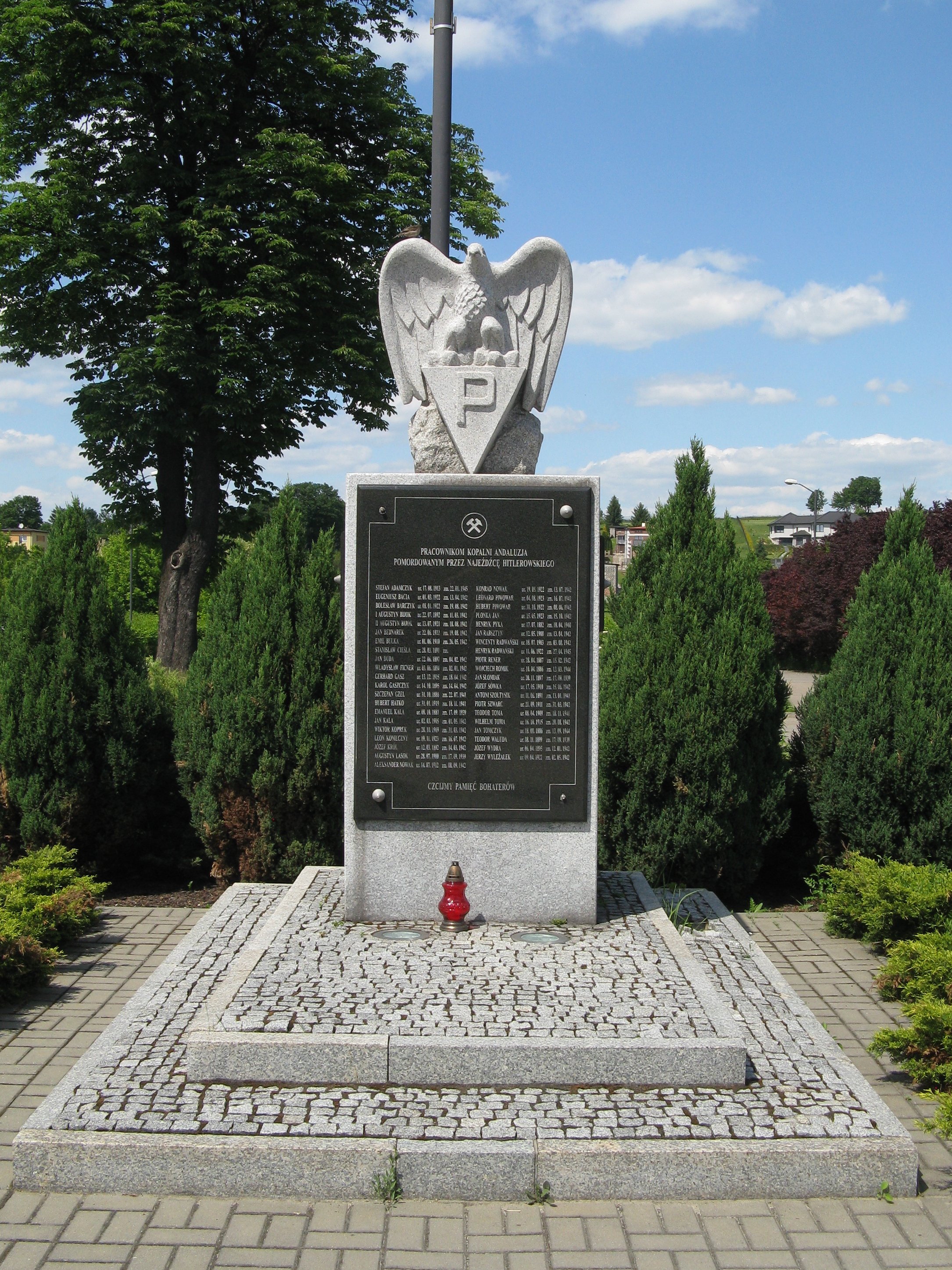 Pomnik pomordowanych pracowników kopalni węgla kamiennego Andaluzja w Piekarach Śląskich.